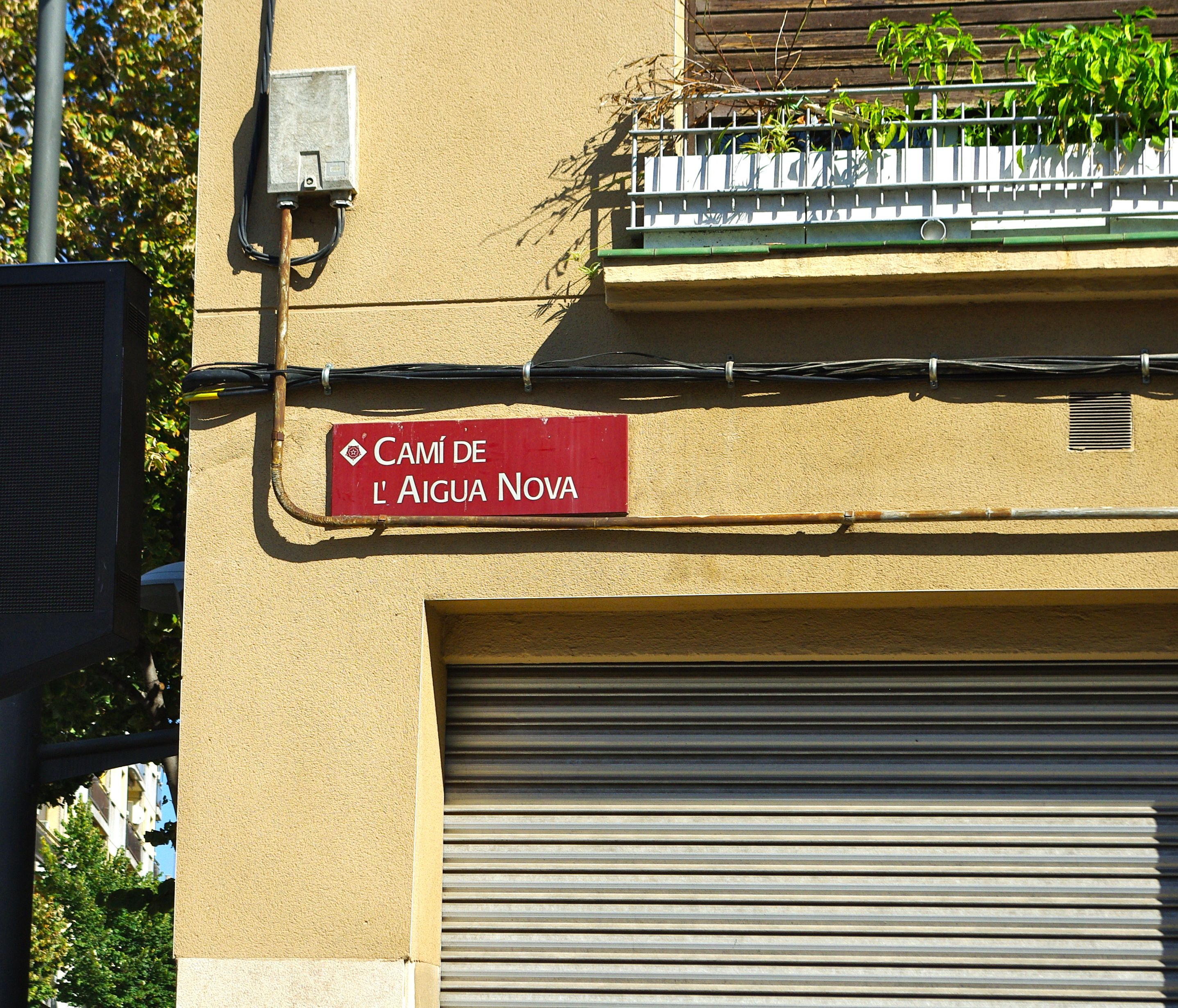 Antic Camí de l'Aigua Nova ara convertit en carrer, a Reus